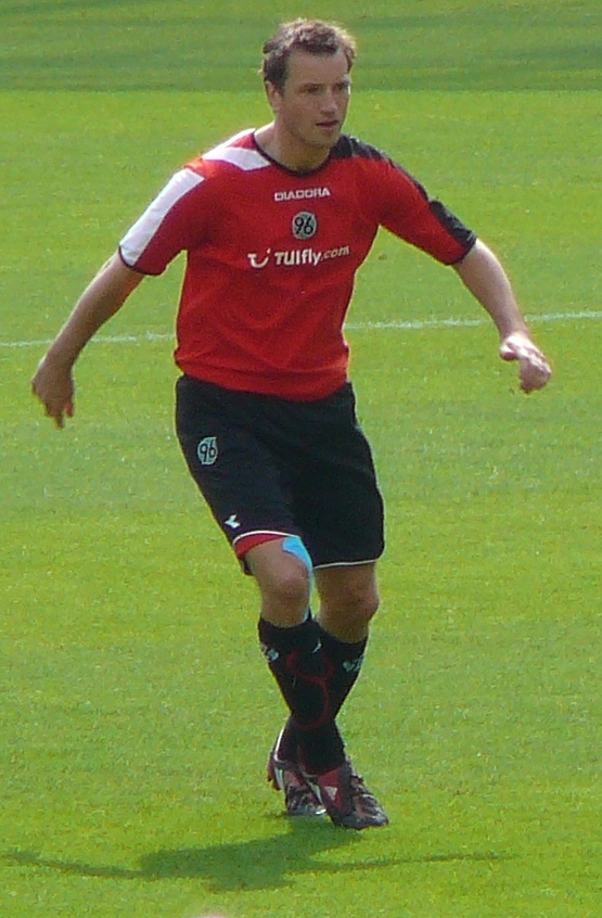 Arnold Bruggink vor dem Heimspiel von Hannover 96